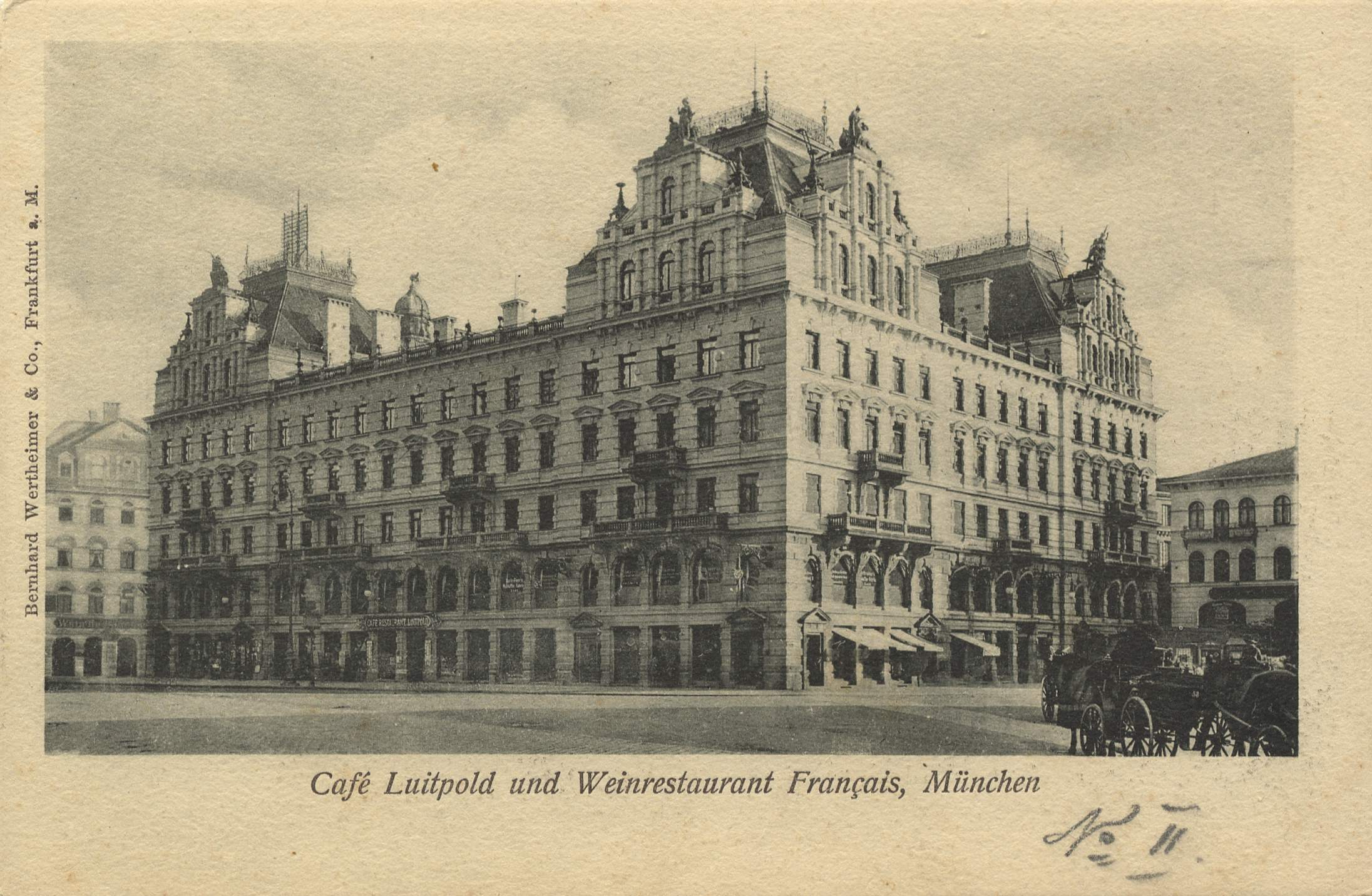 Cafe Luitpold in München um 1900